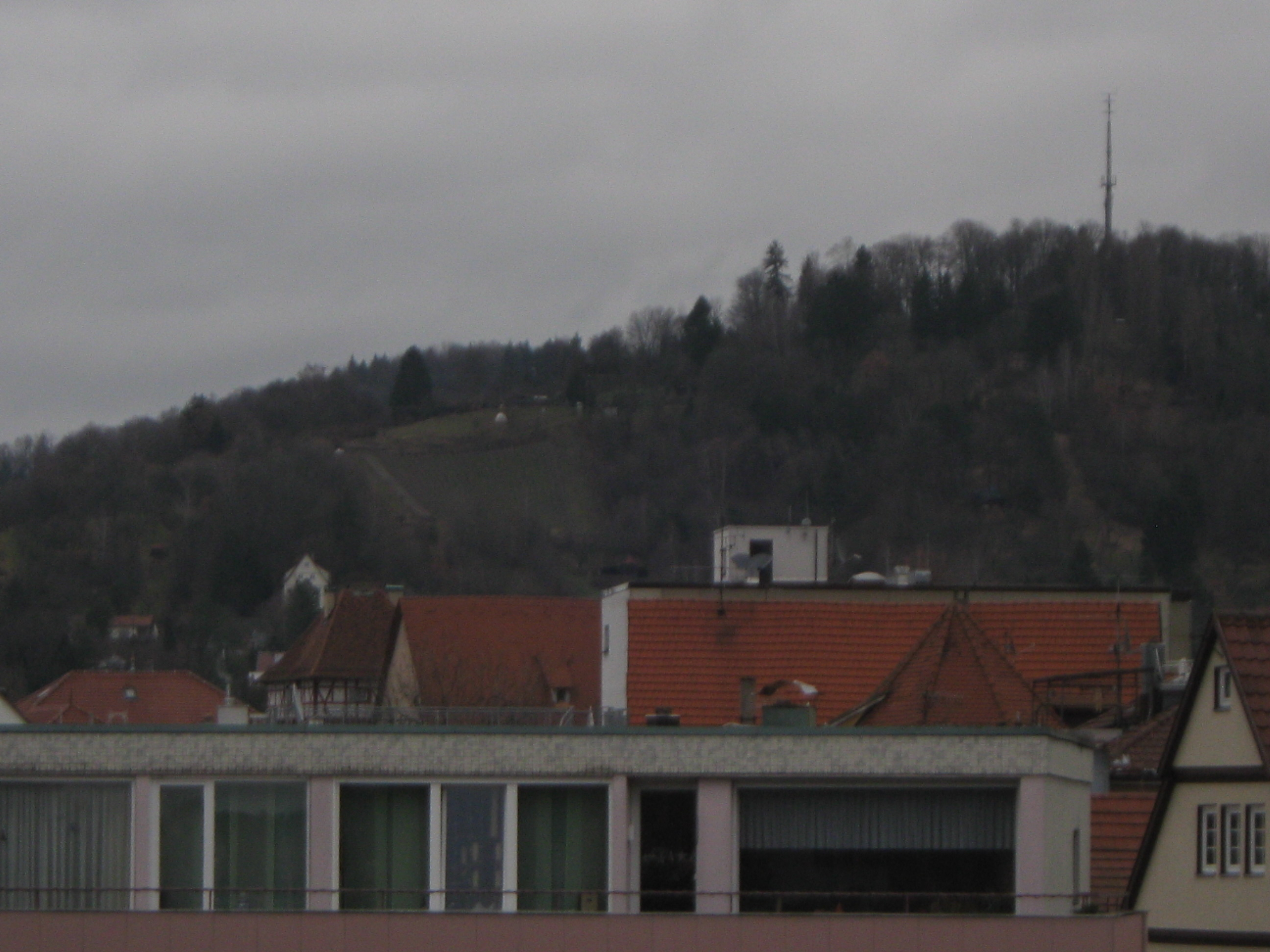 Scheibenberg mit Sommerhalde und Sender Reutlingen